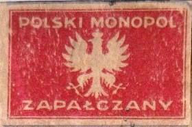 Polski Monopol Zapałczany (1925-ok. 1950), polska etykieta zapałczana sprzed II wojny światowej.